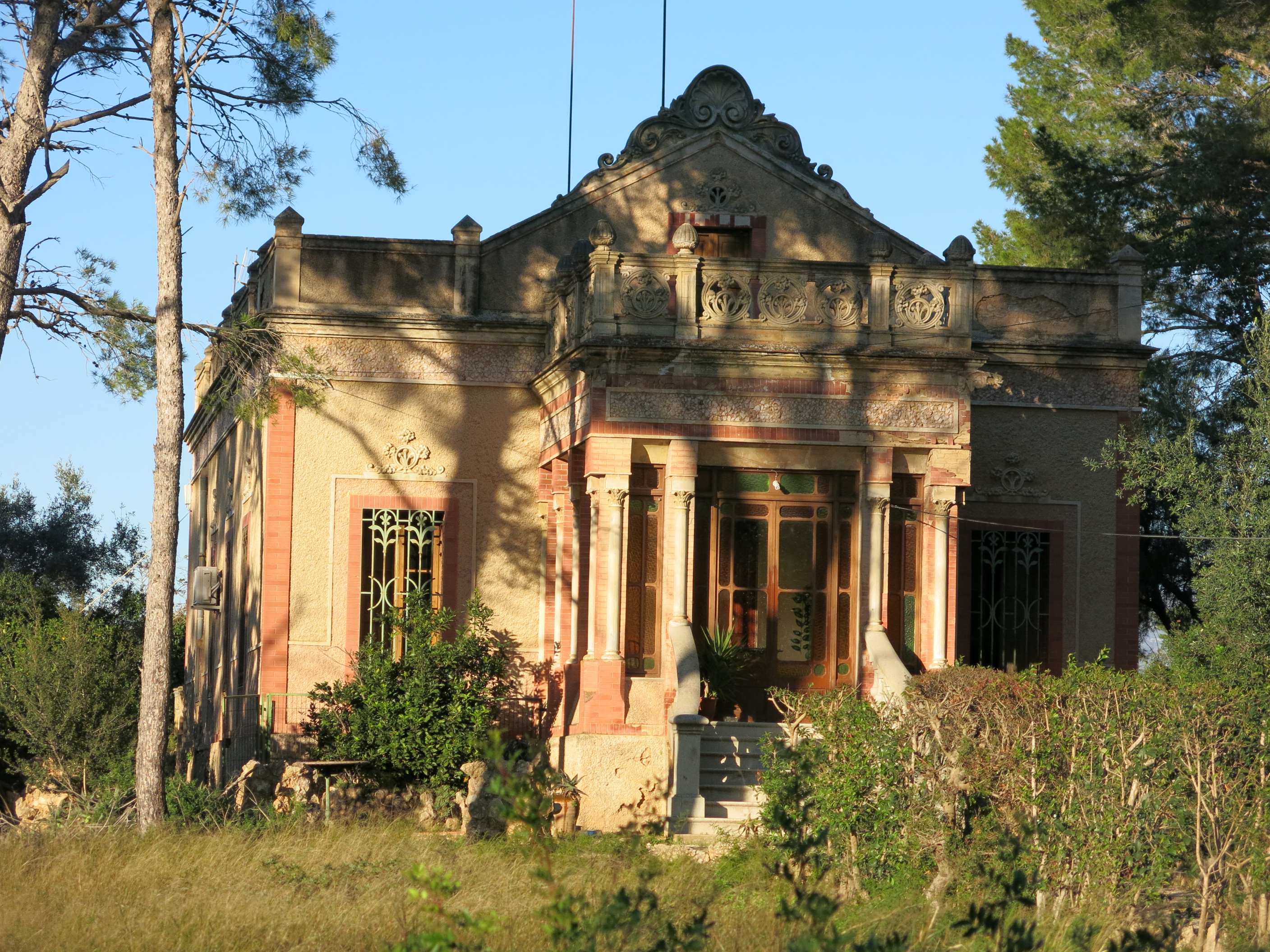 Casa Arasa (Tortosa)